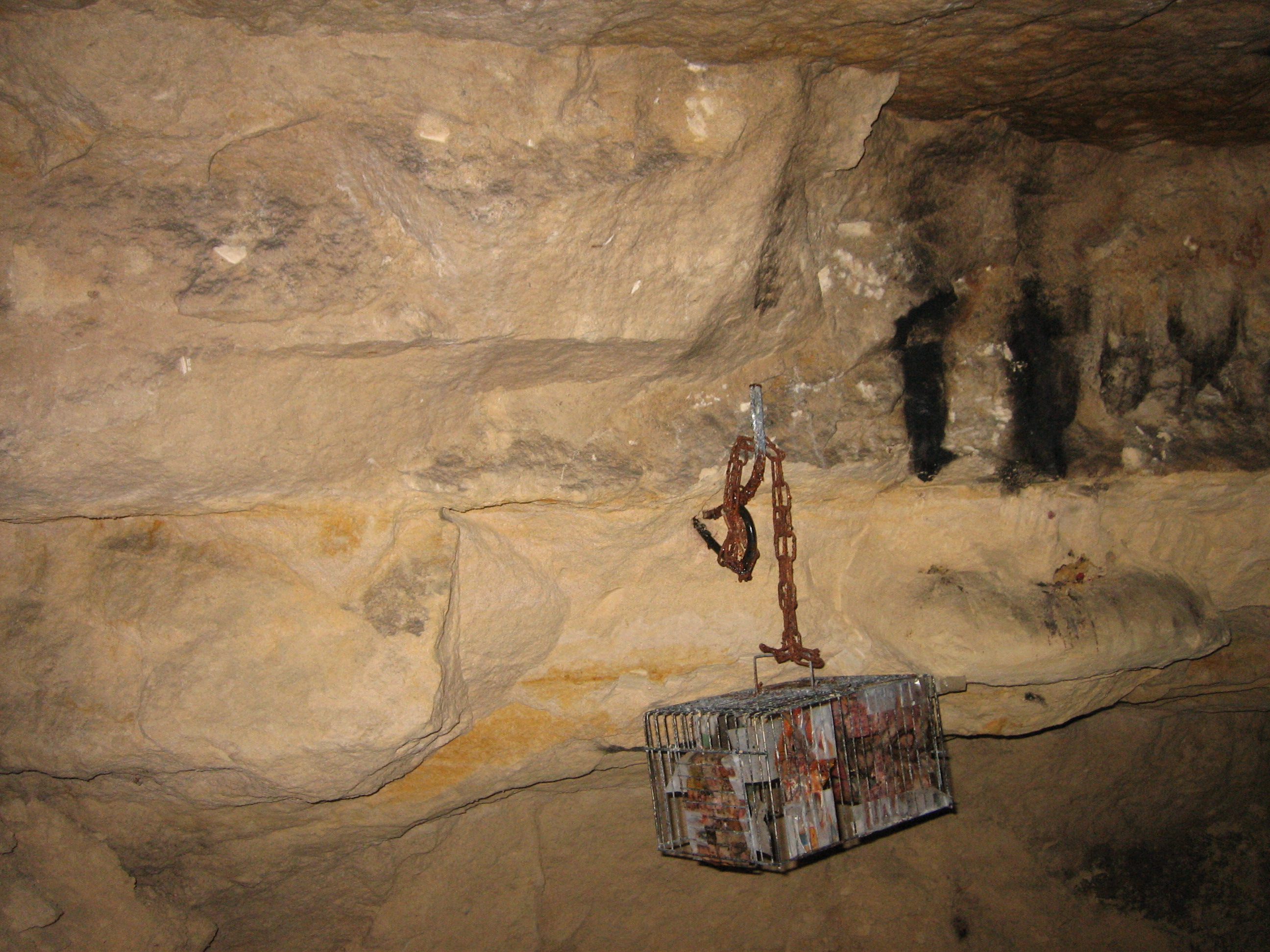 Promenade dans les catacombes de Paris, près du Charlety